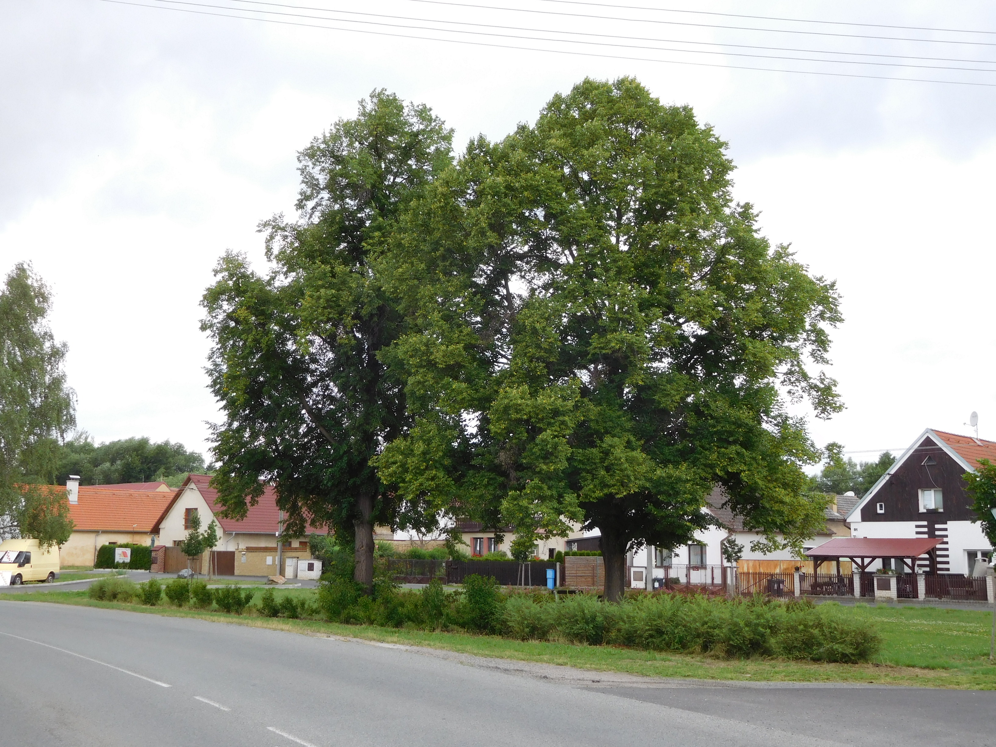 Bdeněves - náves, stromy